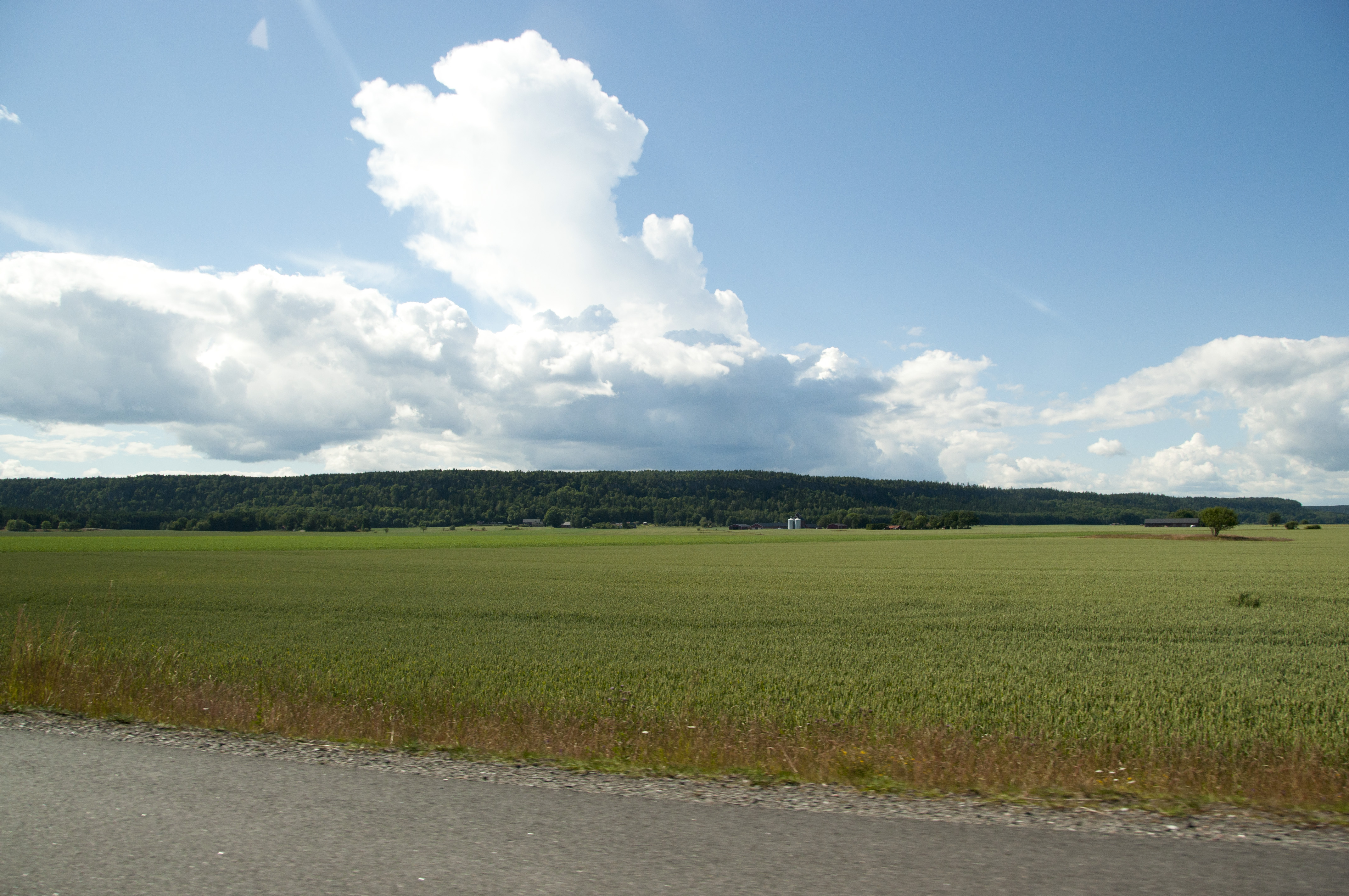 Hunneberg